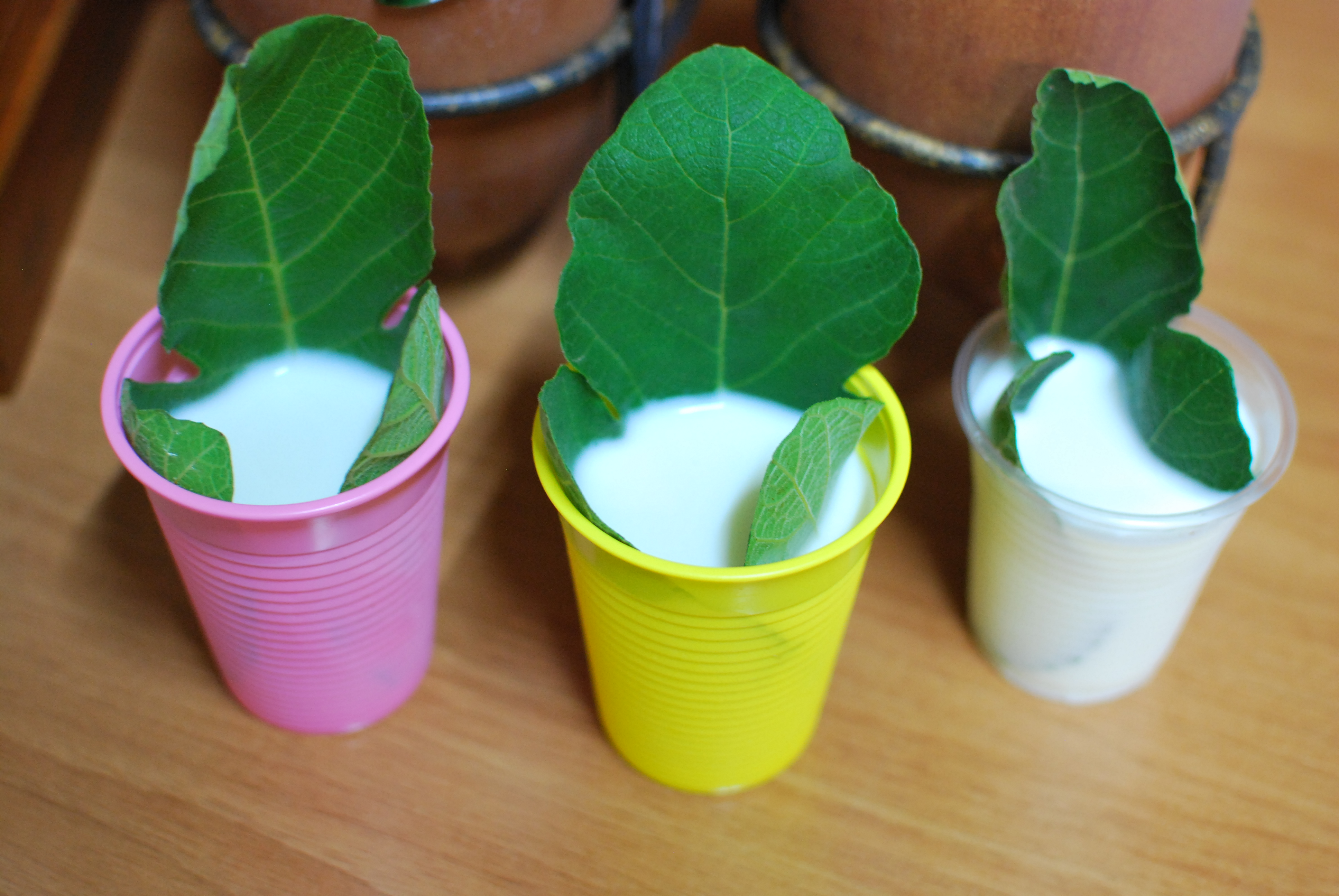 Formaggio tradizionale della provincia di Taranto